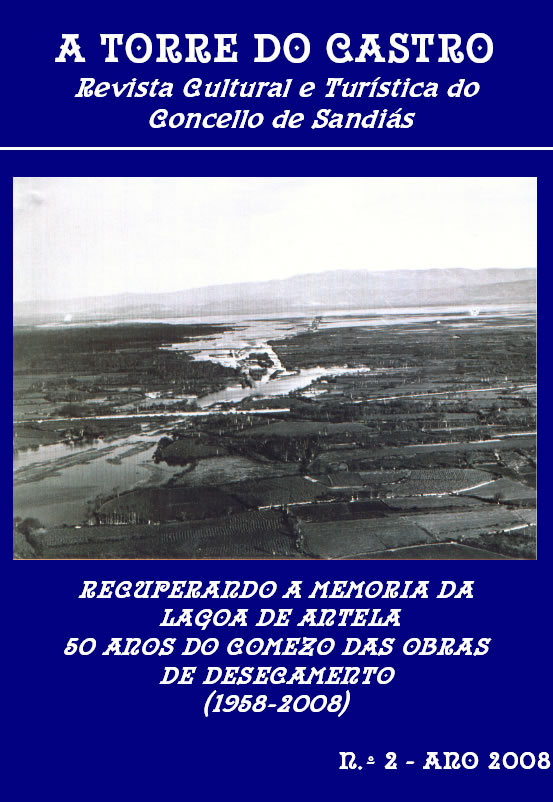 Portada do nº 2 A Torre do Castro dedicada ós 50 anos do comezo das obras de desecamento da lagoa de Antela (1958-2020)